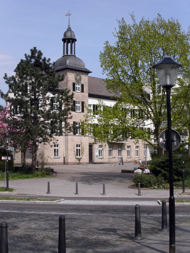 eigene Aufnahme, Mai 2006